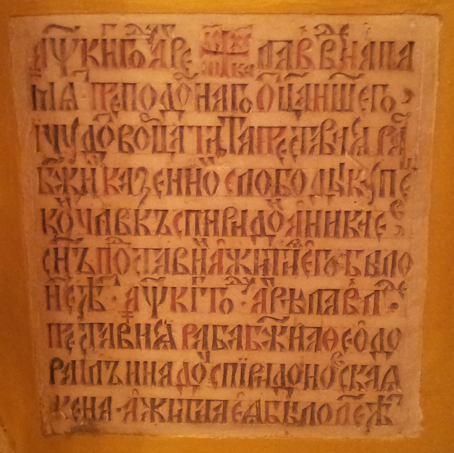 Надгробная плита 1-я половина XVIII века Храм Григория Неокесарийского г. Москва